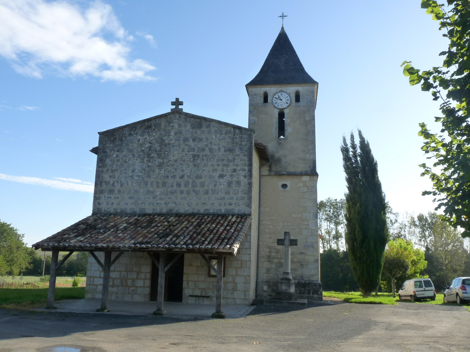 Eglise de Vanzac, Charente-Maritime, France